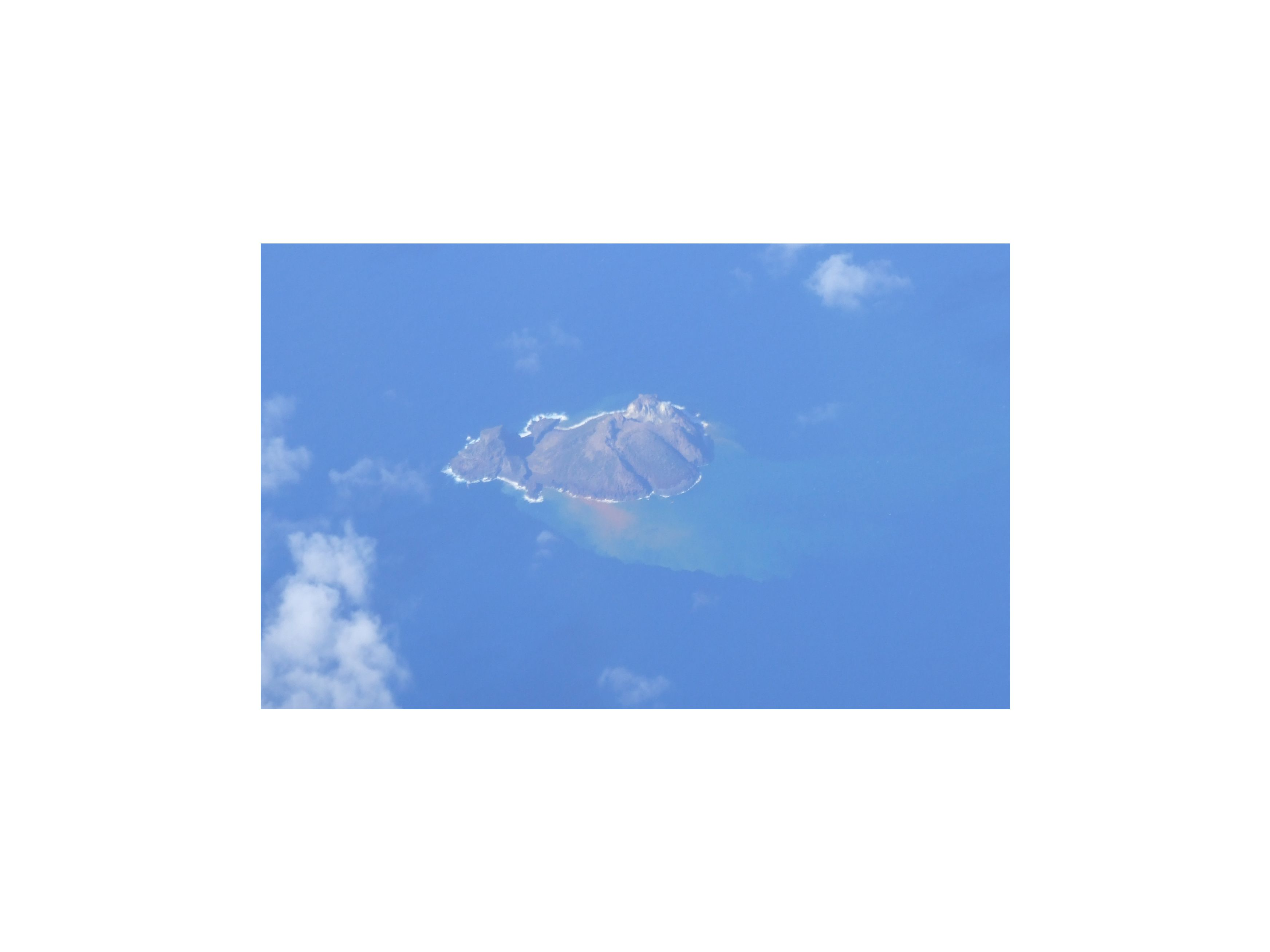 Île Matthew vie d'avion